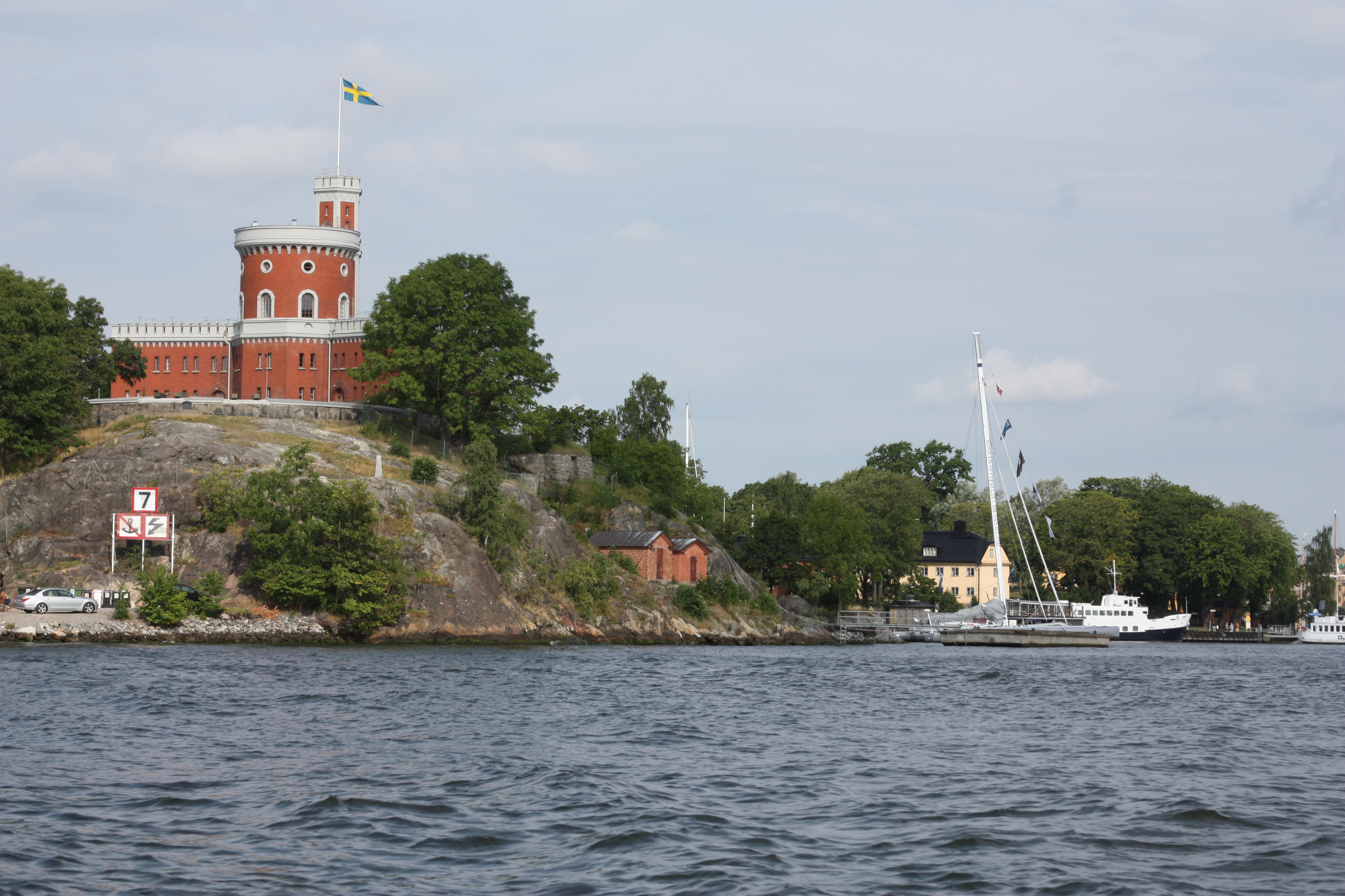 Stockholm